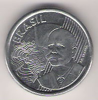 Verso da moeda de 50 centavos da segunda geração. This graphic was created with GIMP.